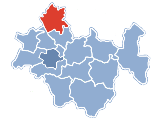 Położenie gminy Kamieńsk na terenie powiatu radomszczańskiego.